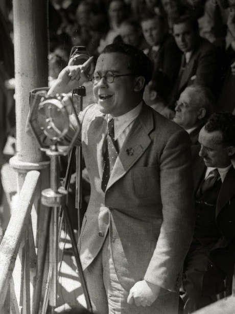 Título original: Discurso de Santiago Carrillo en la plaza de toros de Tolosa (1/3) Localización: Tolosa (Guipúzcoa)